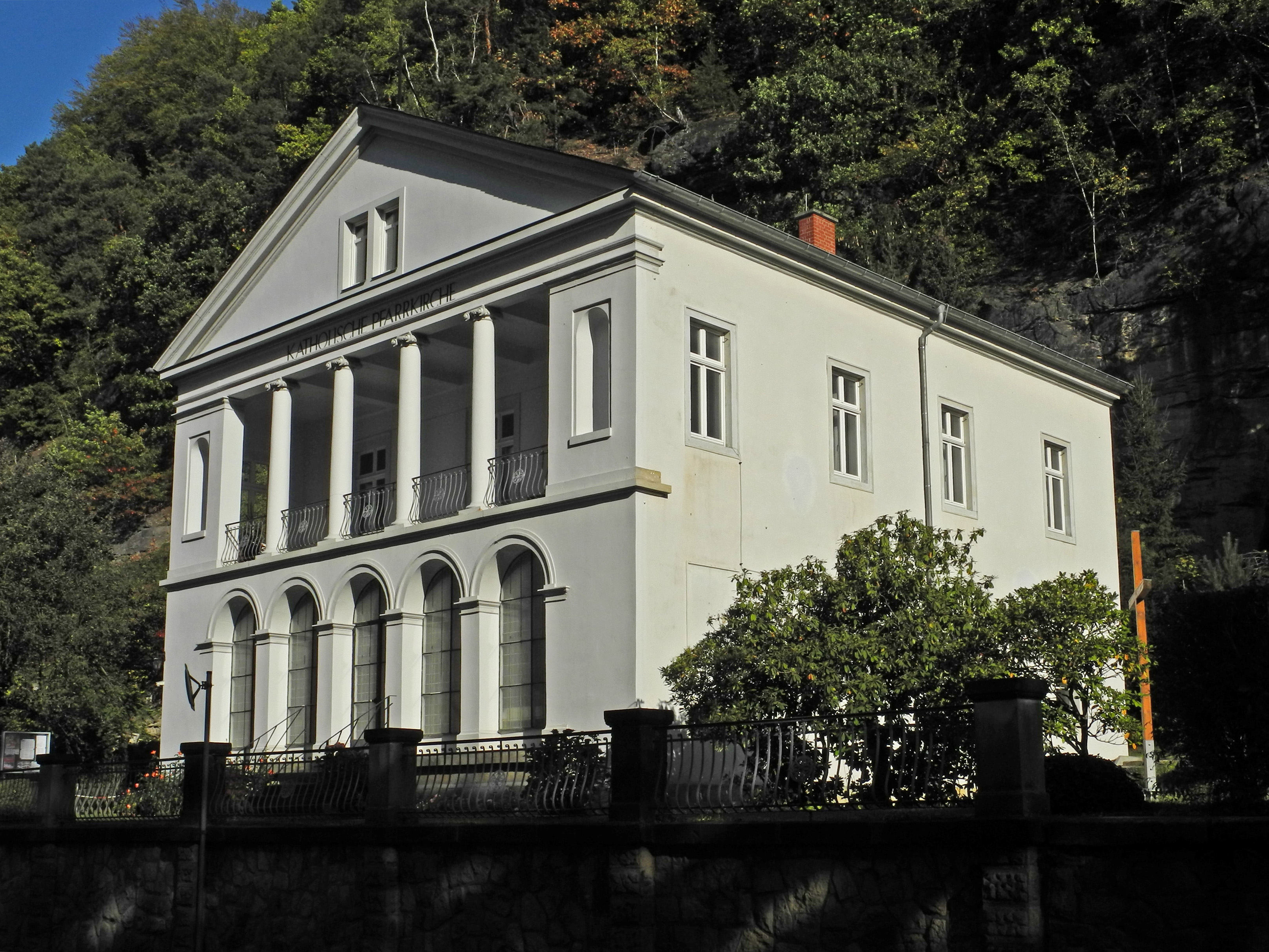 Katholische Kirche und Pfarrei in Bad Schandau, Rudolf-Sendig-Str. 19